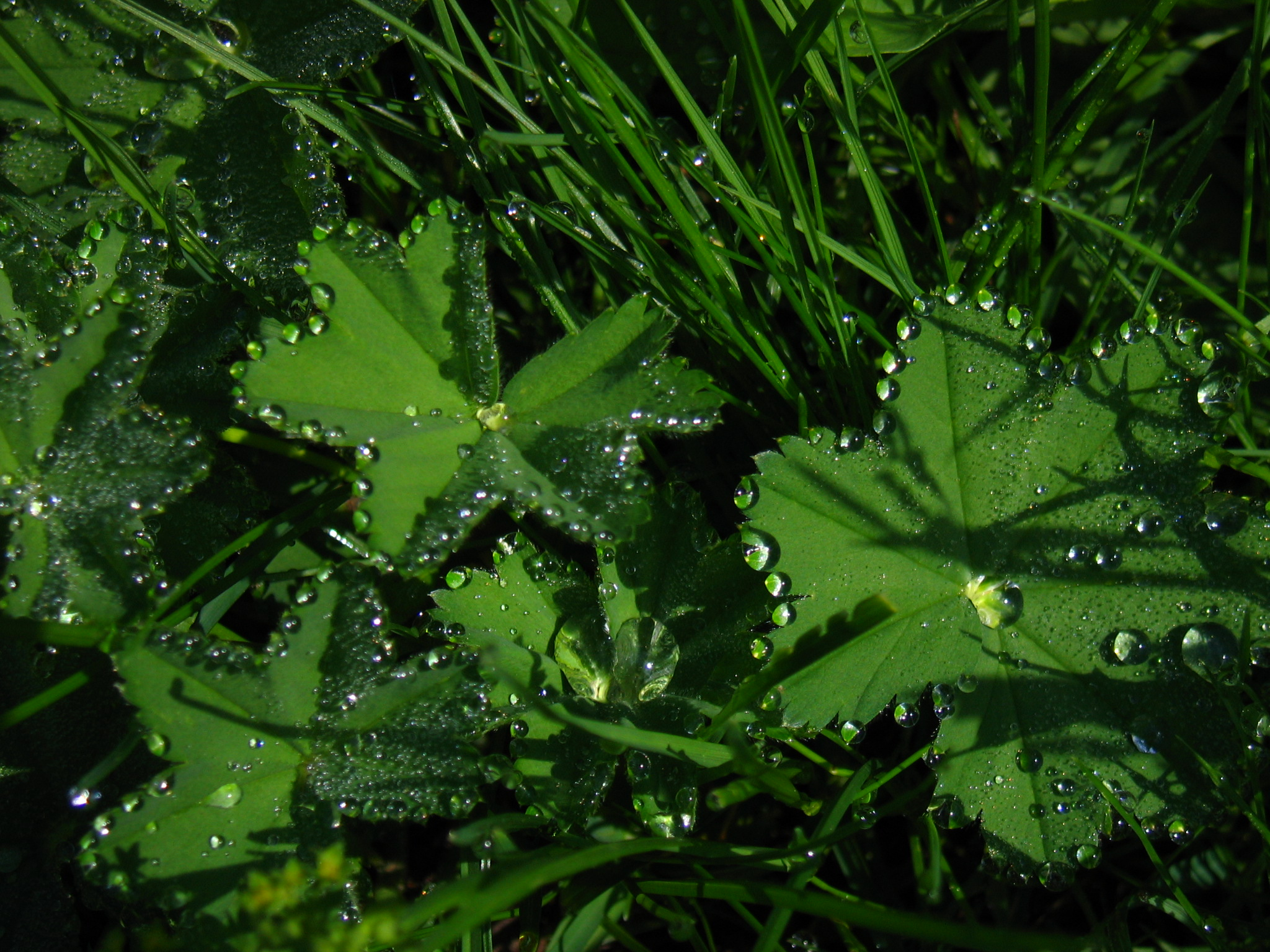 Frauenmantel (Alchemilla sp.)